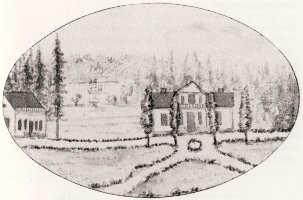 Rosenhill på Djurgården i Stockholm